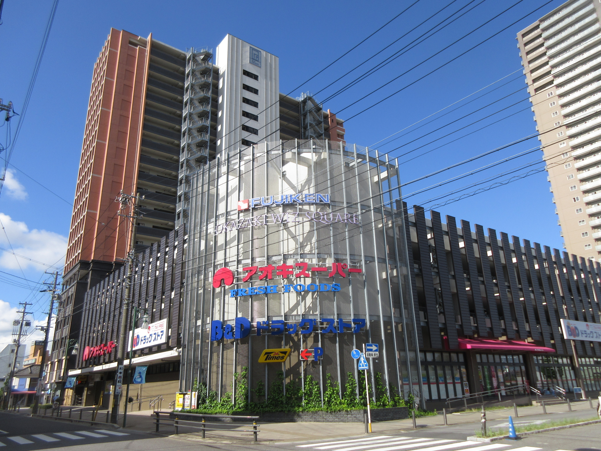 アオキスーパー岡崎康生店（岡崎市康生通西）